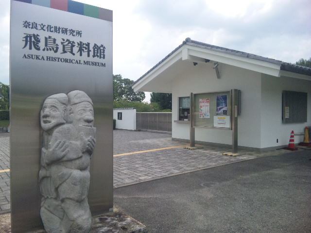 奈良文化財研究所・飛鳥資料館